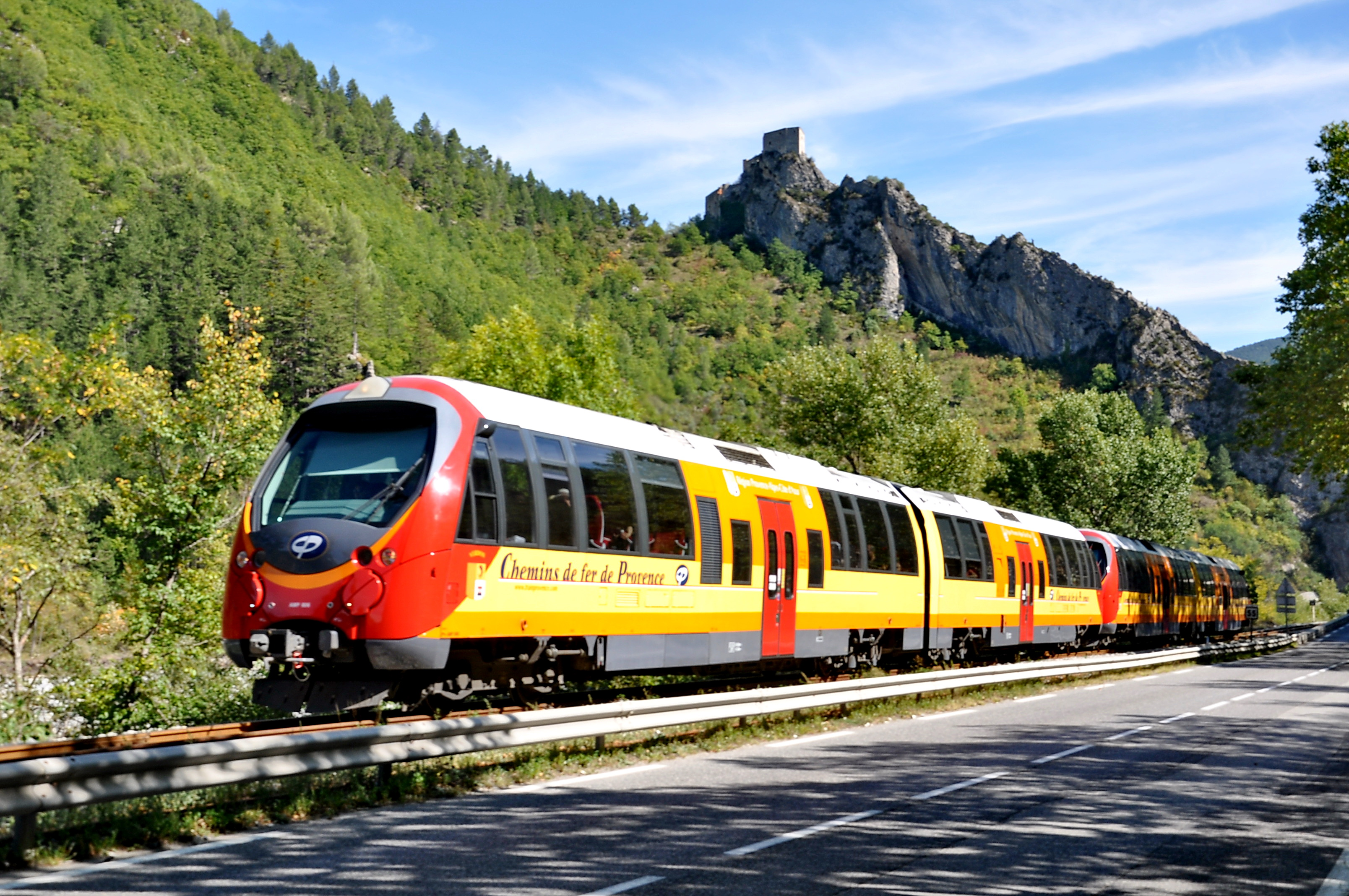 Train Nice-Digne; dit 'train des Pignes'